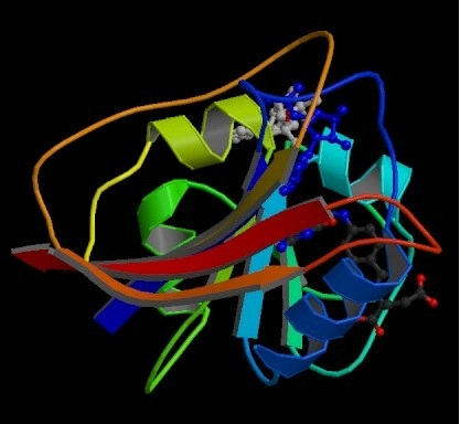 StrukturaTretesore